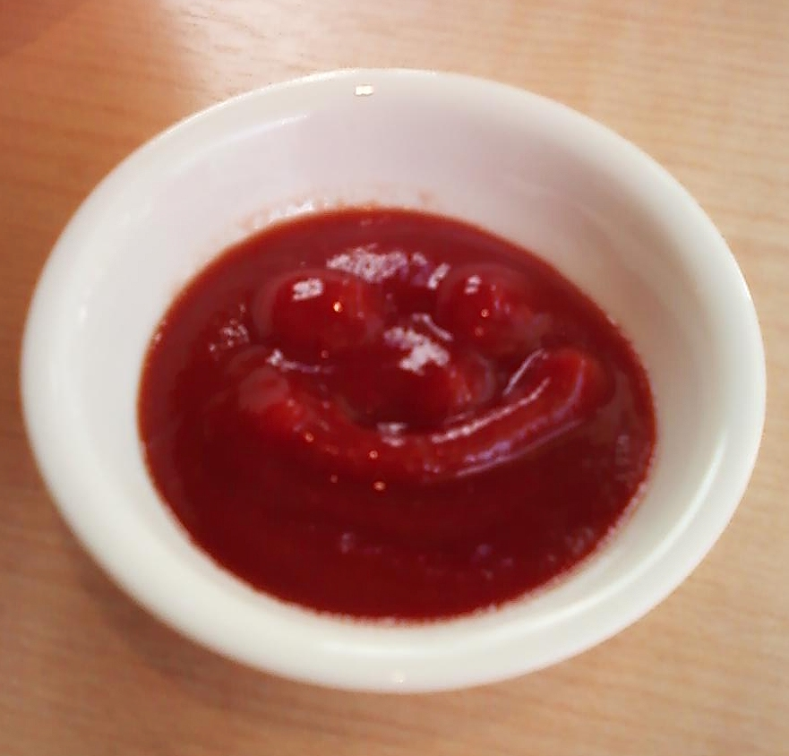 Ketchup